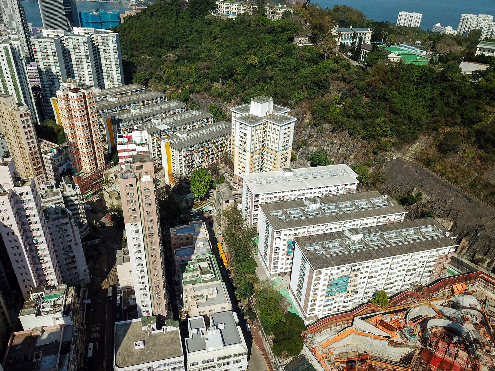 Ming Wah Dai Ha